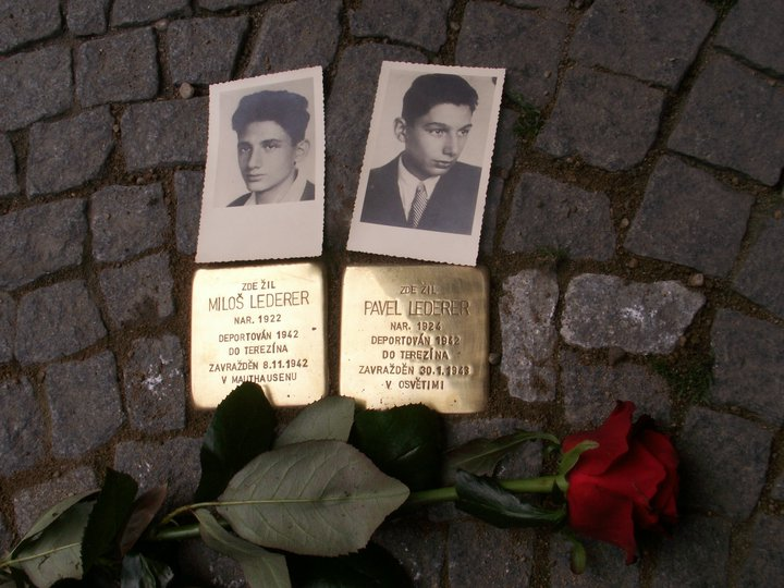 Dva Stolpersteine za bratry Miloše a Pavla Ledererovy ve vinohradské Slezské ulici, rok 2011.